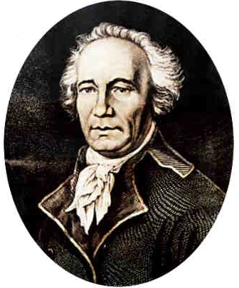 Андрей Тимофеевич Болотов картина